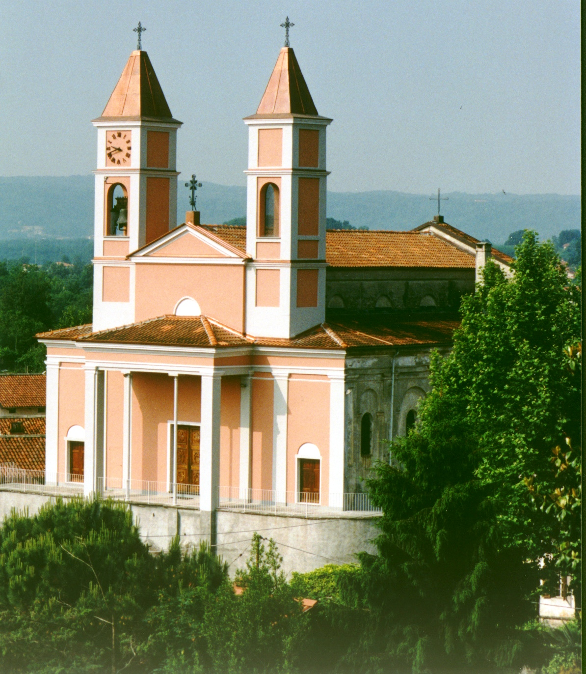 Chiesa di San Cristoforo Banchette